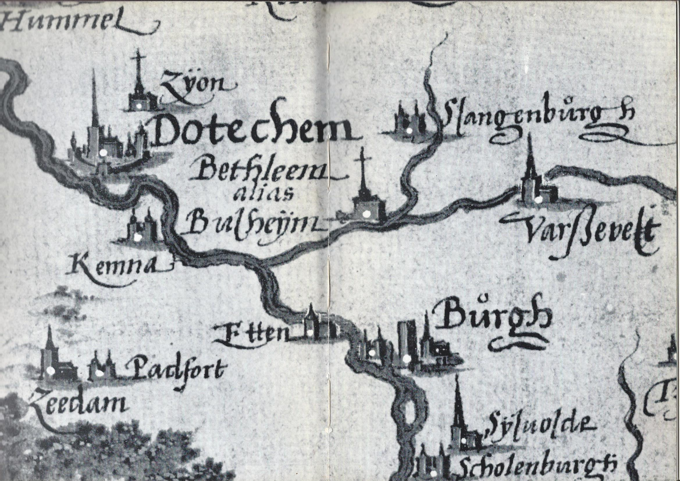 Detail kaart van Gelre en Kleef uit 1573 met de kloosters Zyon en Bethlehem, de stad Doetinchem, de kerspels Varsseveld, Terborg, Silvolde en Zeddam, de kastelen Slangenburg, Burgh, Schuilenburg, Padevoort en Kemnade